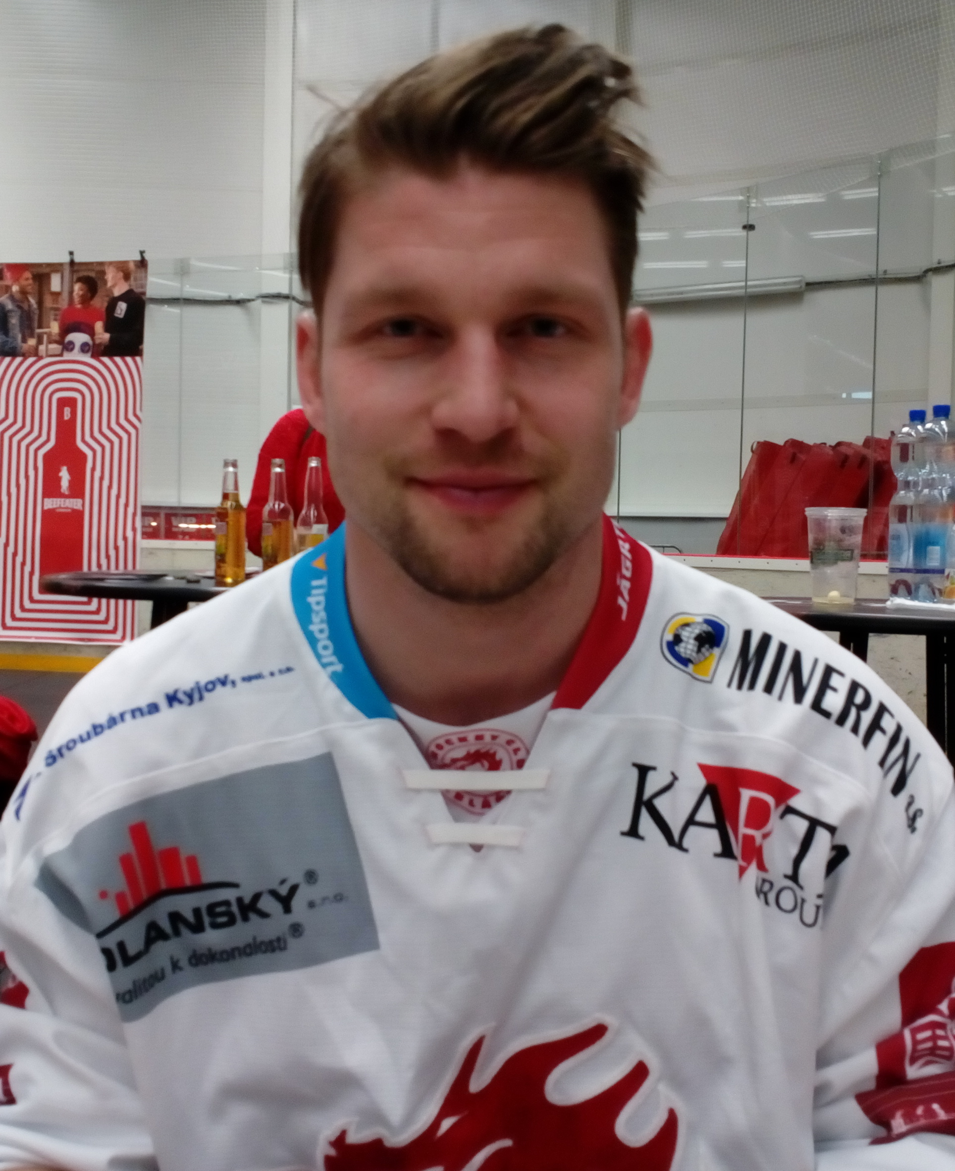 Po zakončení sezóny 2018/19 na autogramiádě v malé (tréningové) Werk Areně